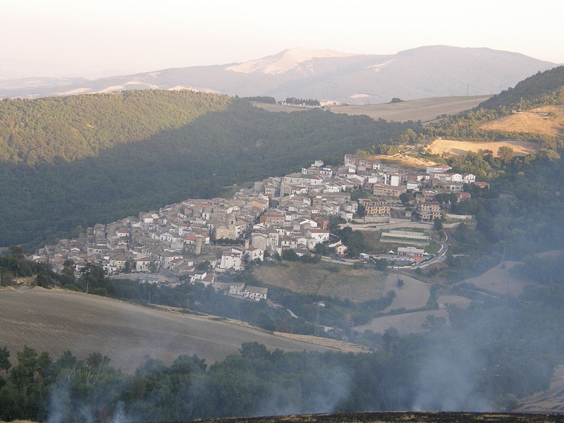 Apulia Molise Campania 2009